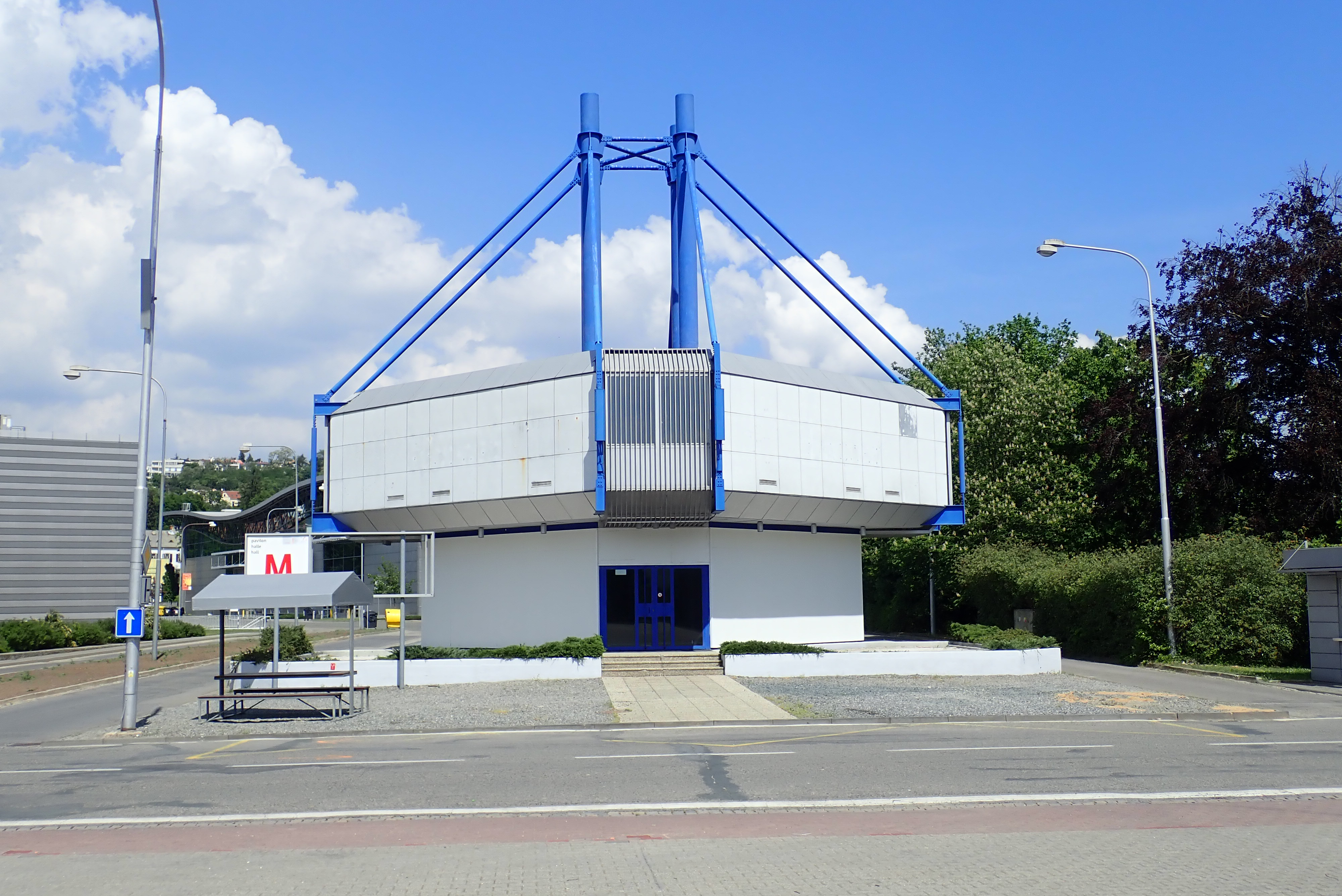 Pavilon M